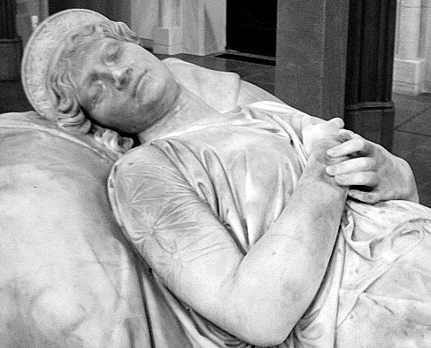 Berlin, Mitte, Museum Friedrichswerdersche Kirche: Grabmal der Königin Luise von Preußen von Christian Daniel Rauch